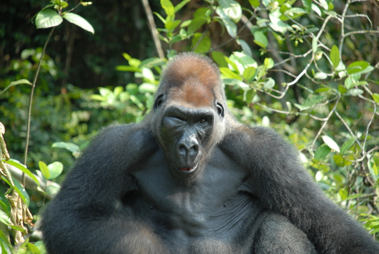 Gorilla gorilla gorilla, Congo